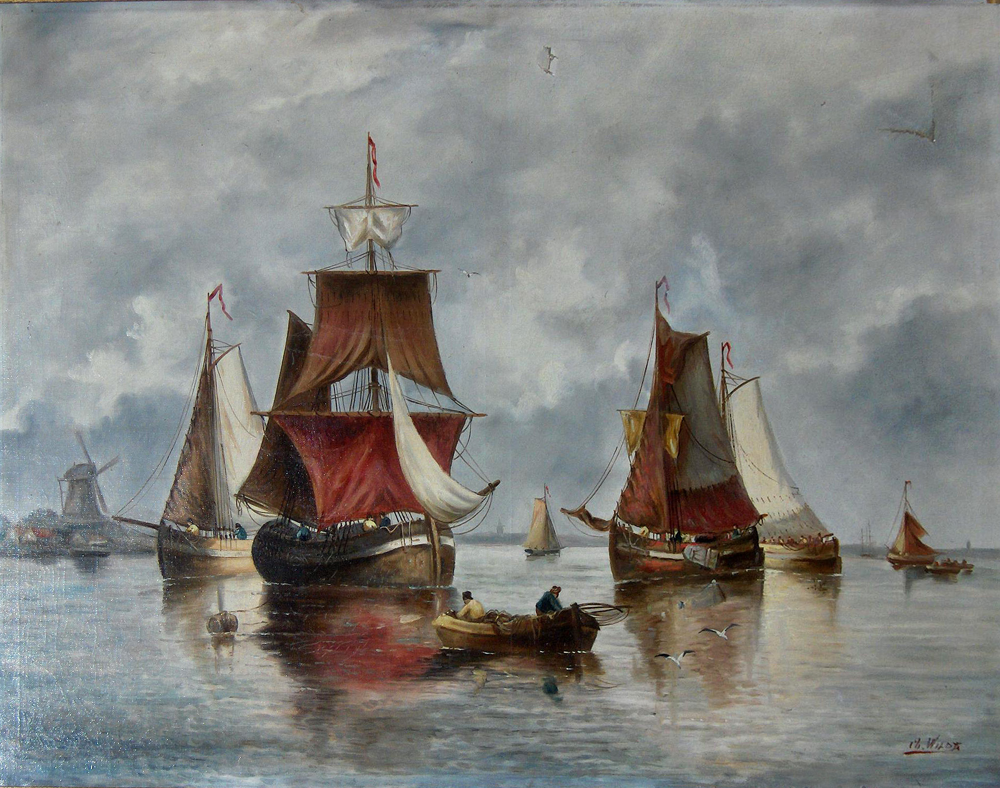 "Marine met vissersboten" , olieverf op doek door Charles Wildt (1851-1912); privé bezit